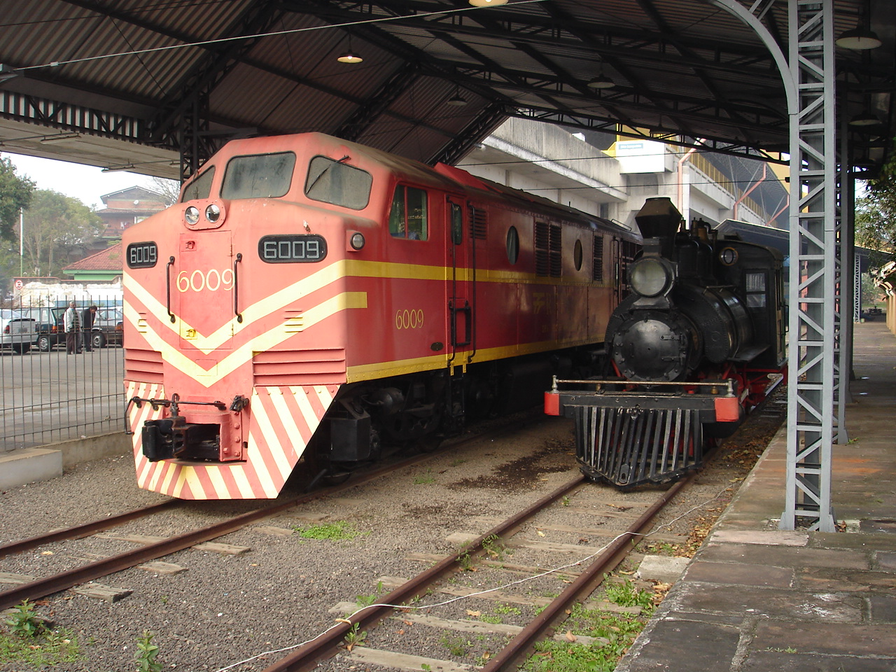 RFFSA 6009, GMDL B12 b-b 1125hp Museu do Trem em São Leopoldo-RS-Brasil